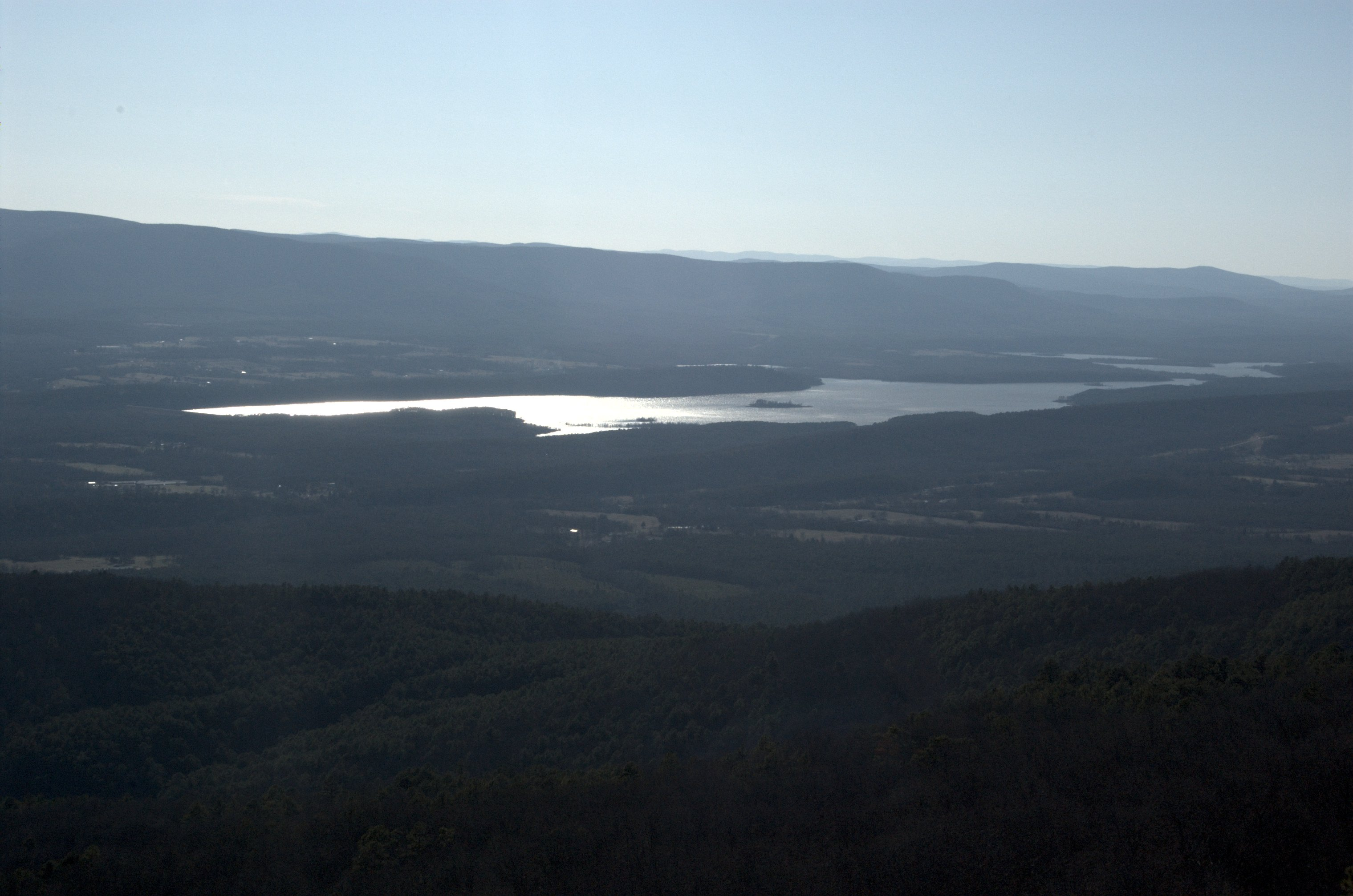 Blue Mountain Lake